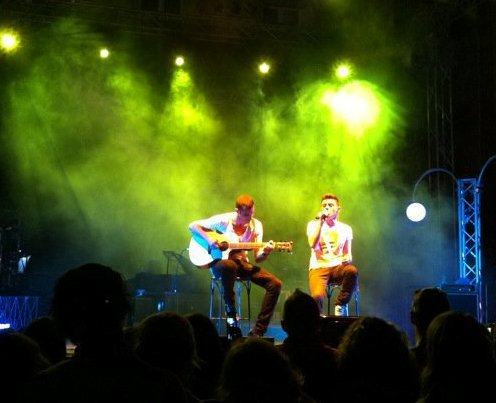 Virginio durante un live